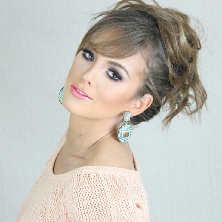 Fotografía Begoña Narváez